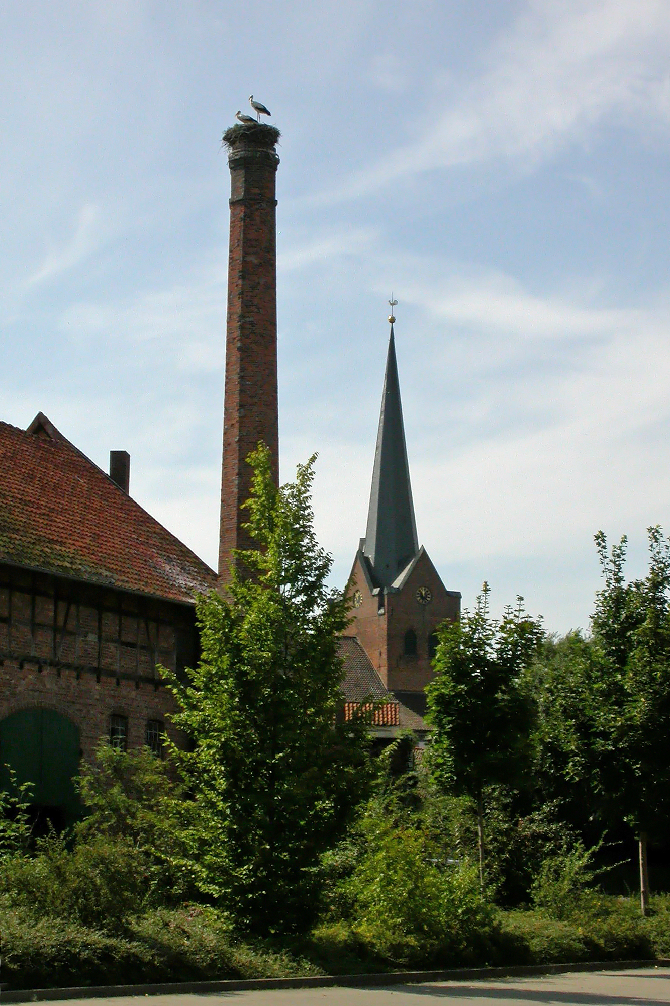 Alter Brauereischornstein mit Storchennest in Dannenberg (Elbe). Im Hintergrund die St.-Johannis-Kirche. Blickrichtung Südwest. Standort: Parkplatz Werder.